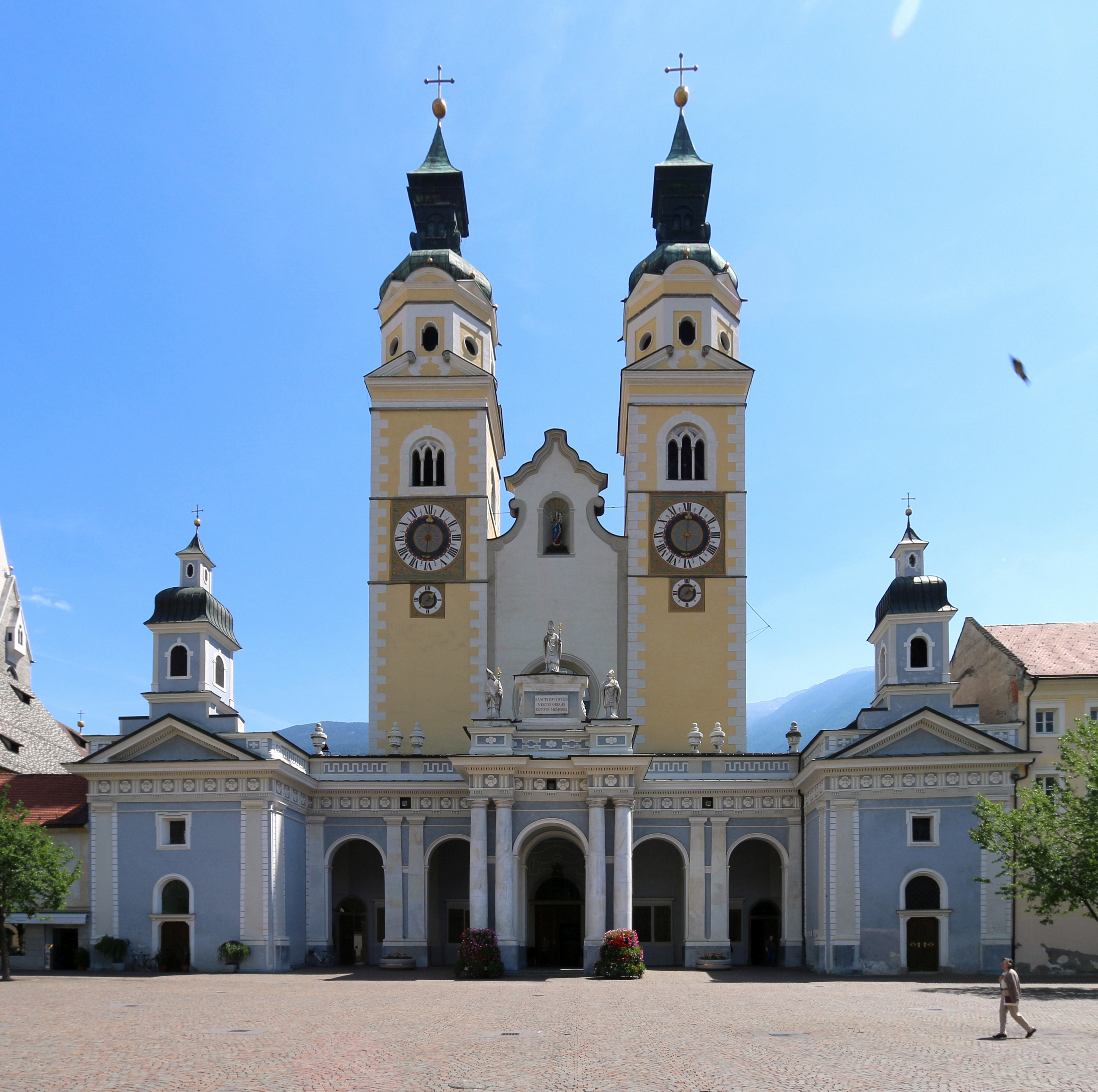 Brixen, Südtirol: Brixener Dom Mariä Himmelfahrt